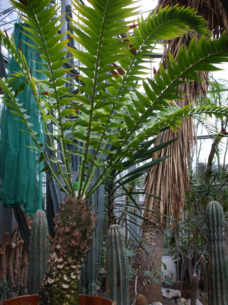 Encephalartos woodii in Amsterdam Hortus Botanicus (Botanical garden)